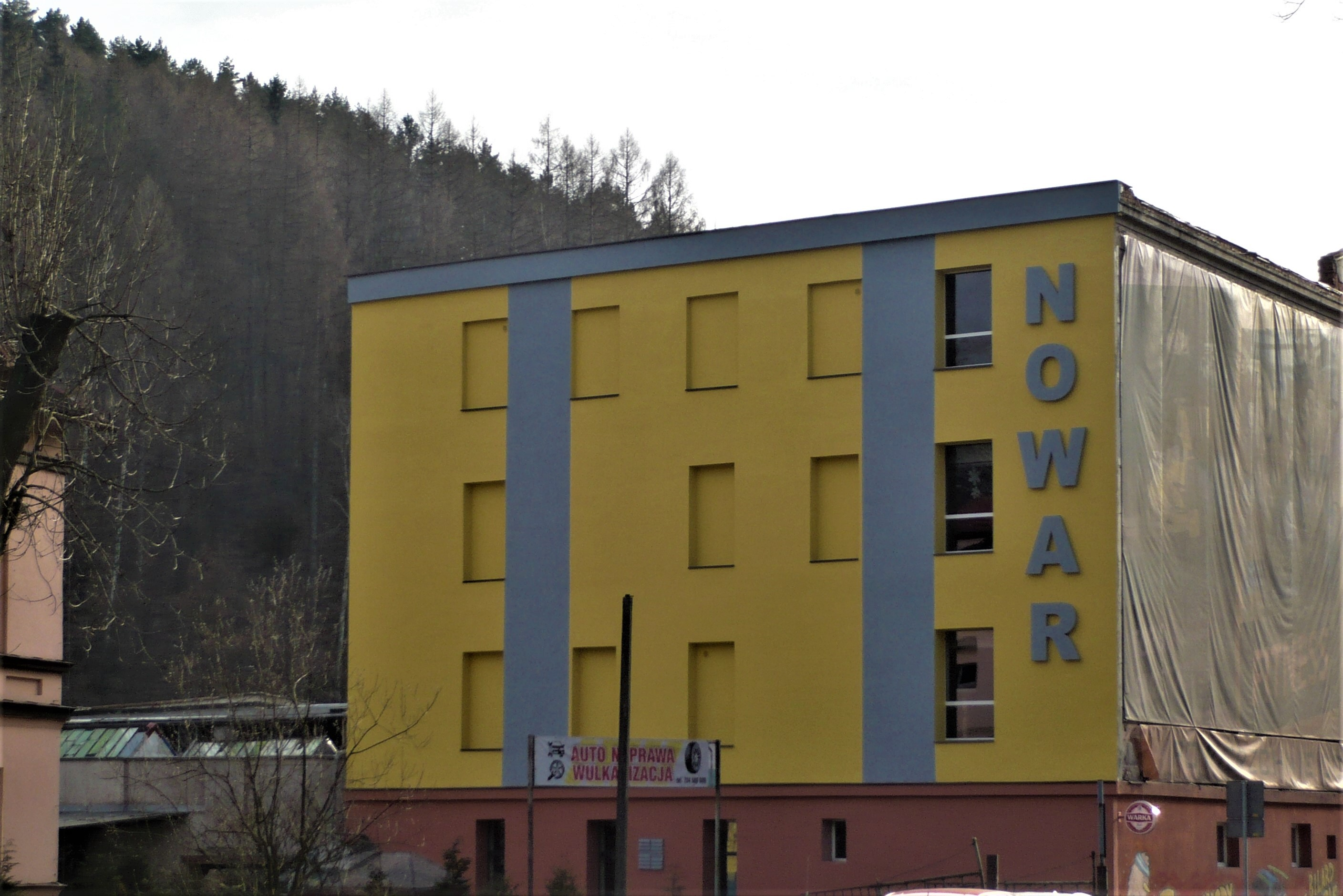 Nowar